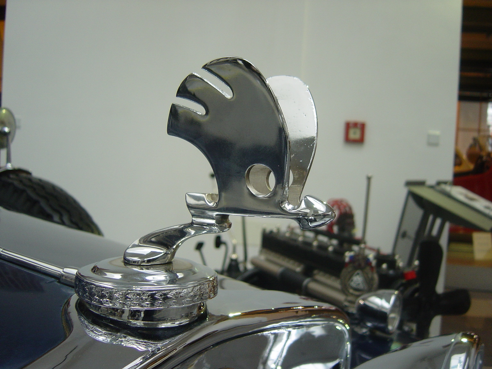 Skoda